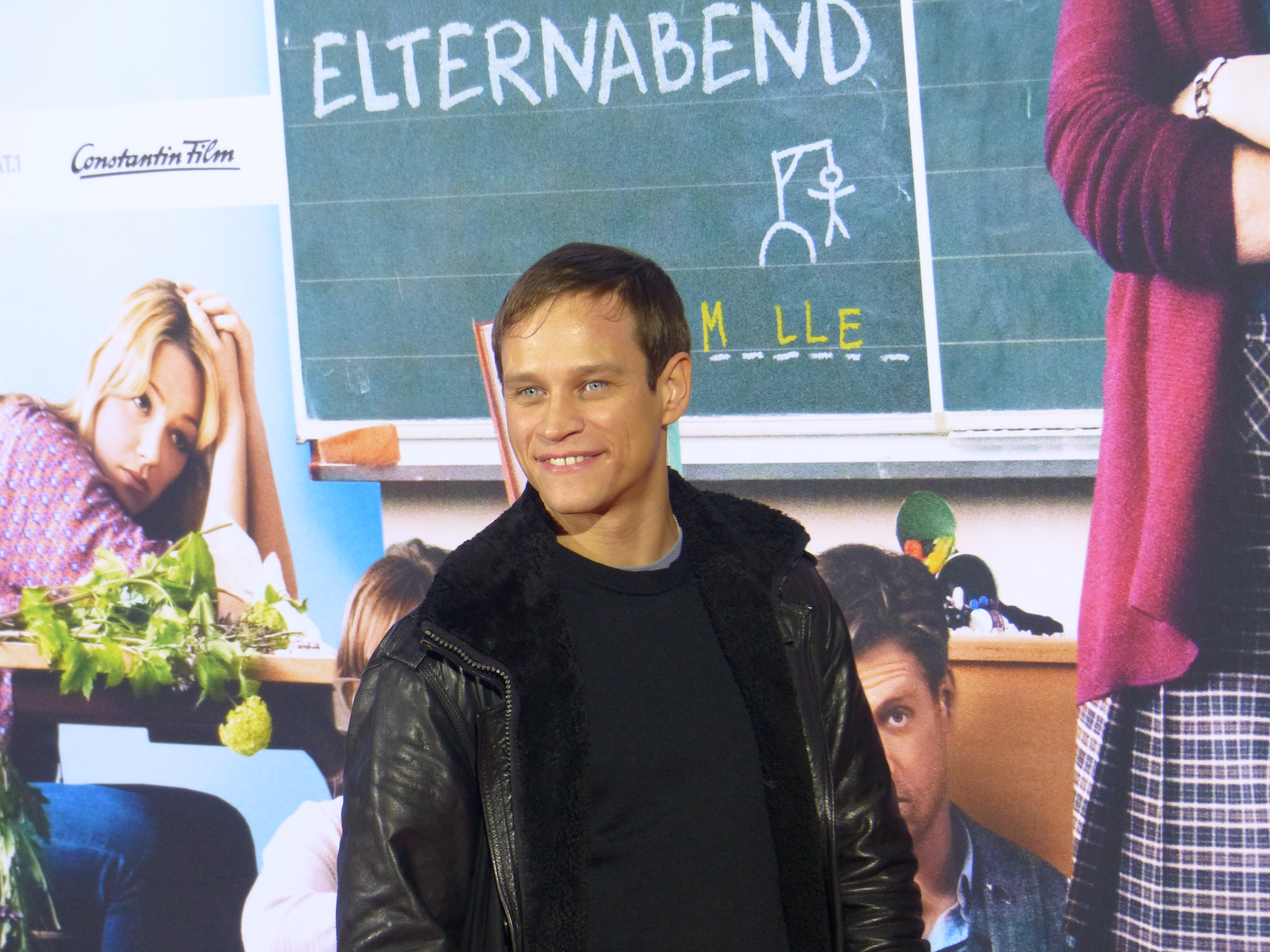 Vinzenz Kiefer bei der Kinopremiere von "Frau Müller muss weg", Januar 2015, Cinedom Köln